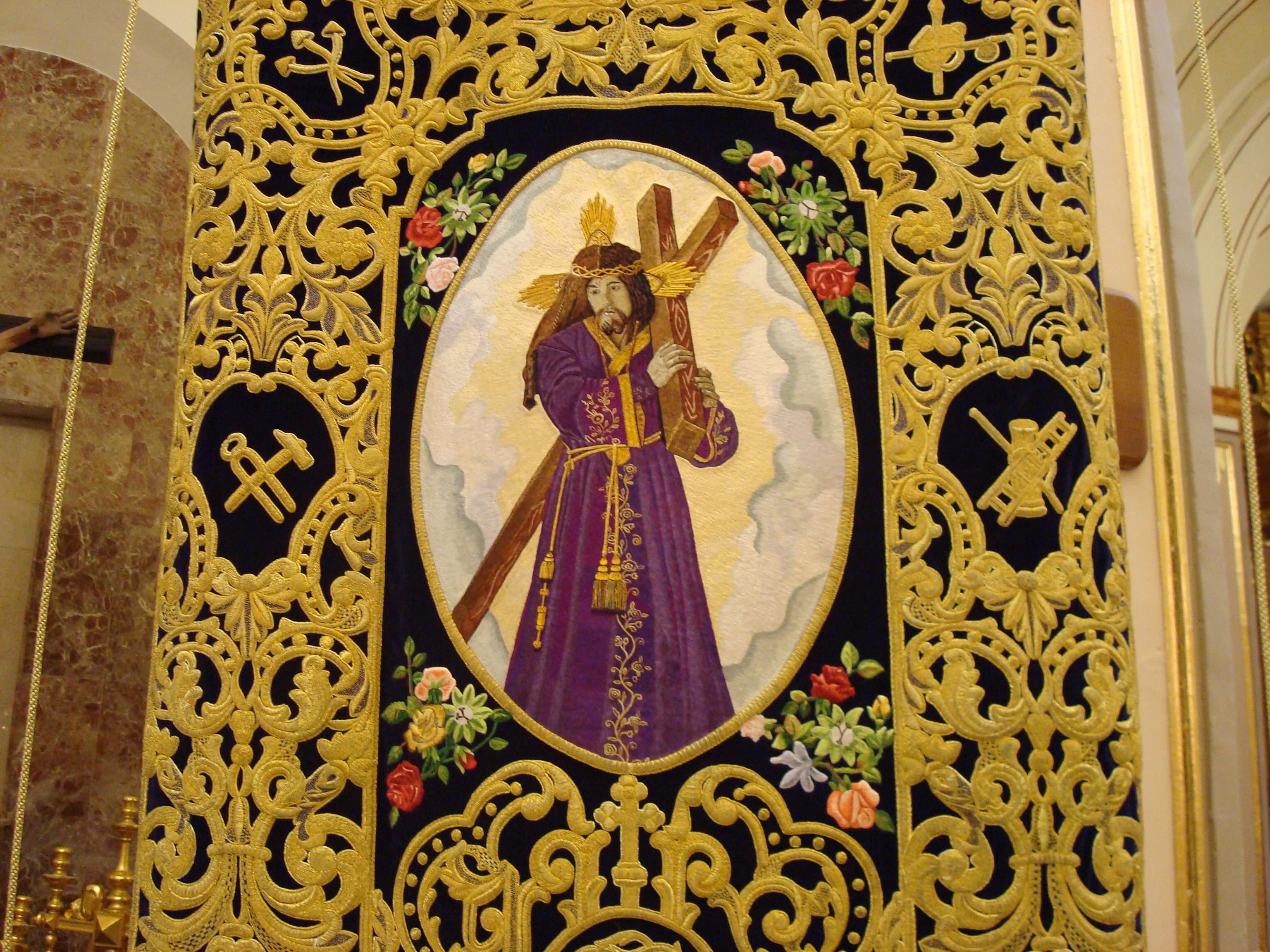 Estandarte titular del Paso Morado, representa la imagen del Cristo del Perdón, Semana Santa, Lorca